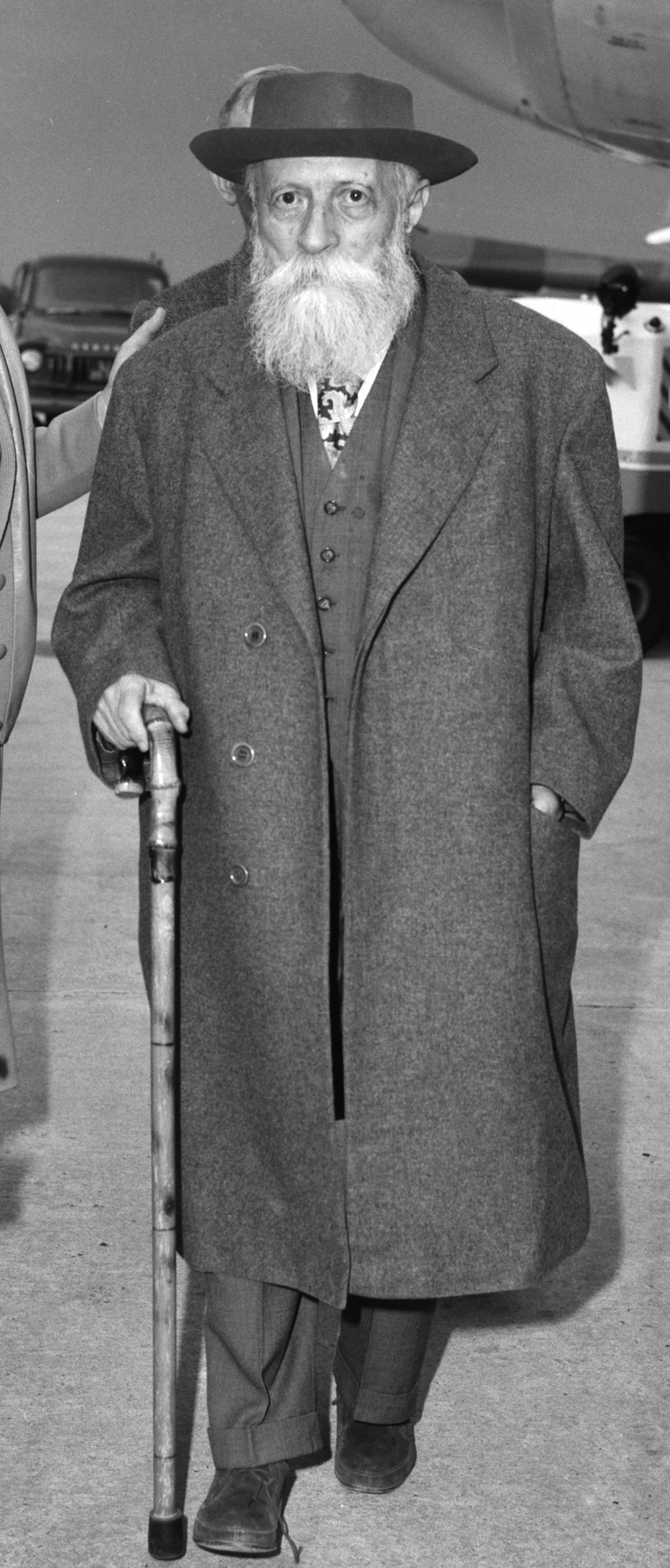 Professor Martin Buber arriveerde op Schiphol voor in ontvangstnemen Erasmus-prijs. Professor Martin Buber